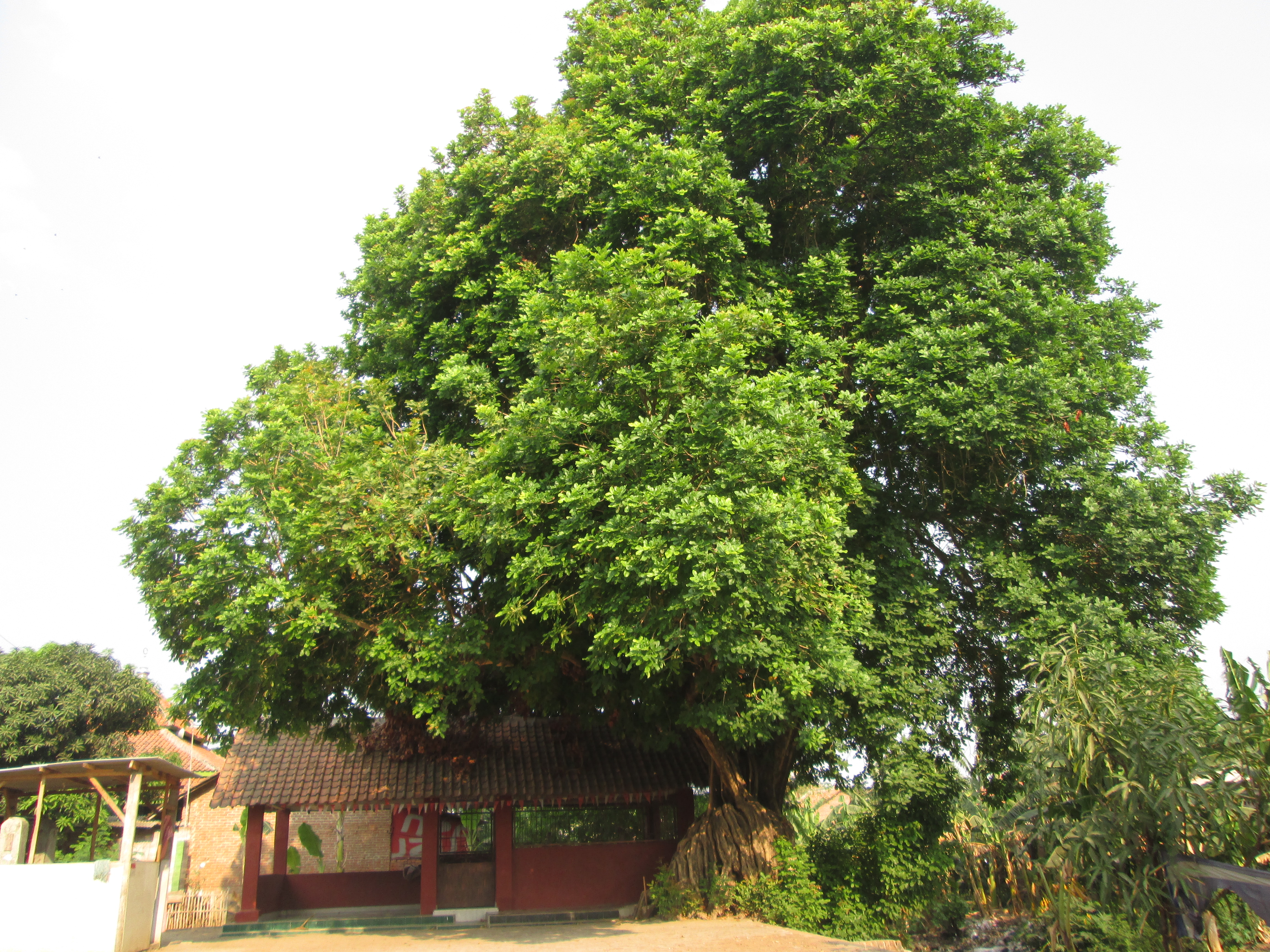 Pohon Kesambi